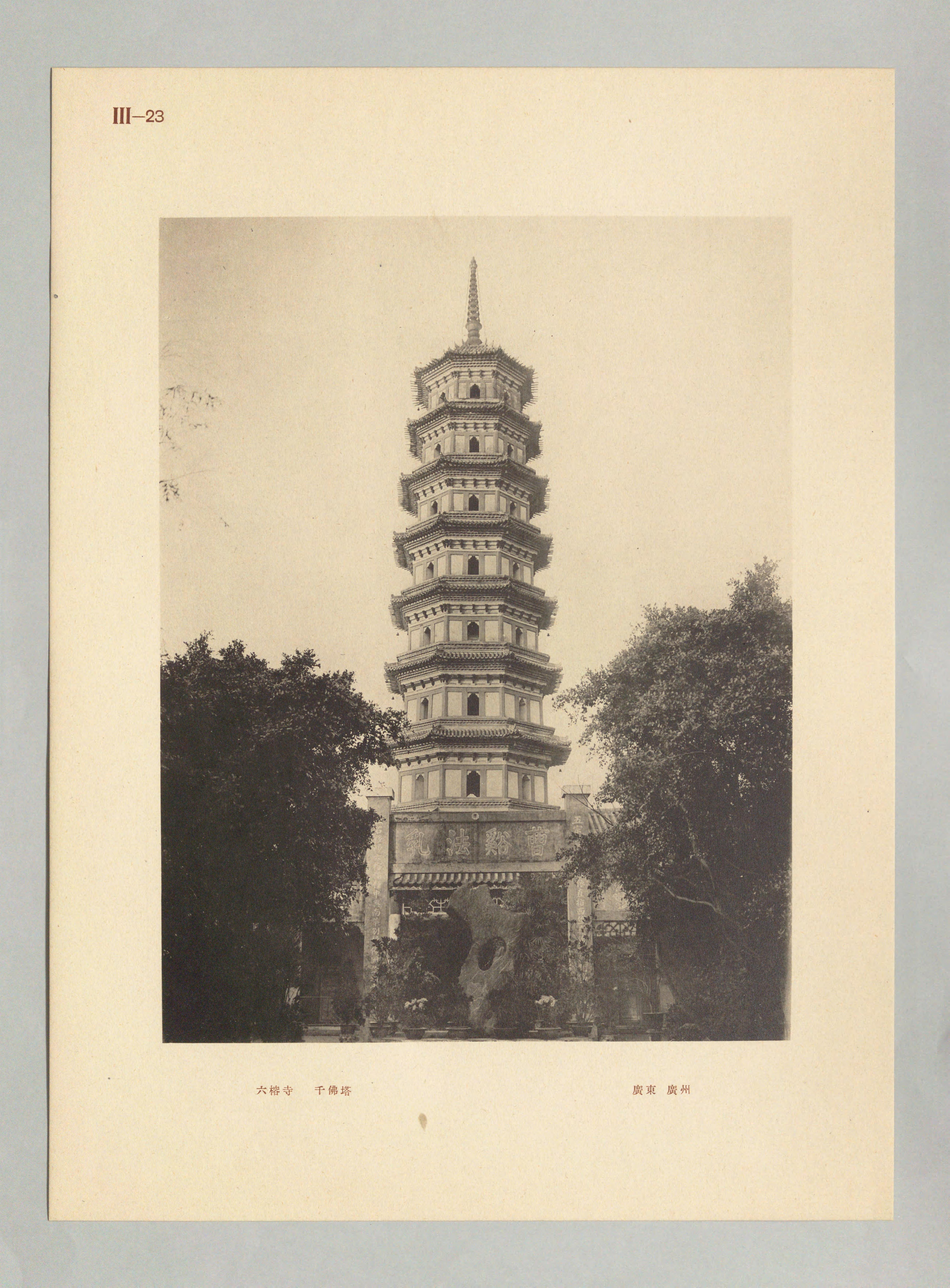 六榕寺花塔。